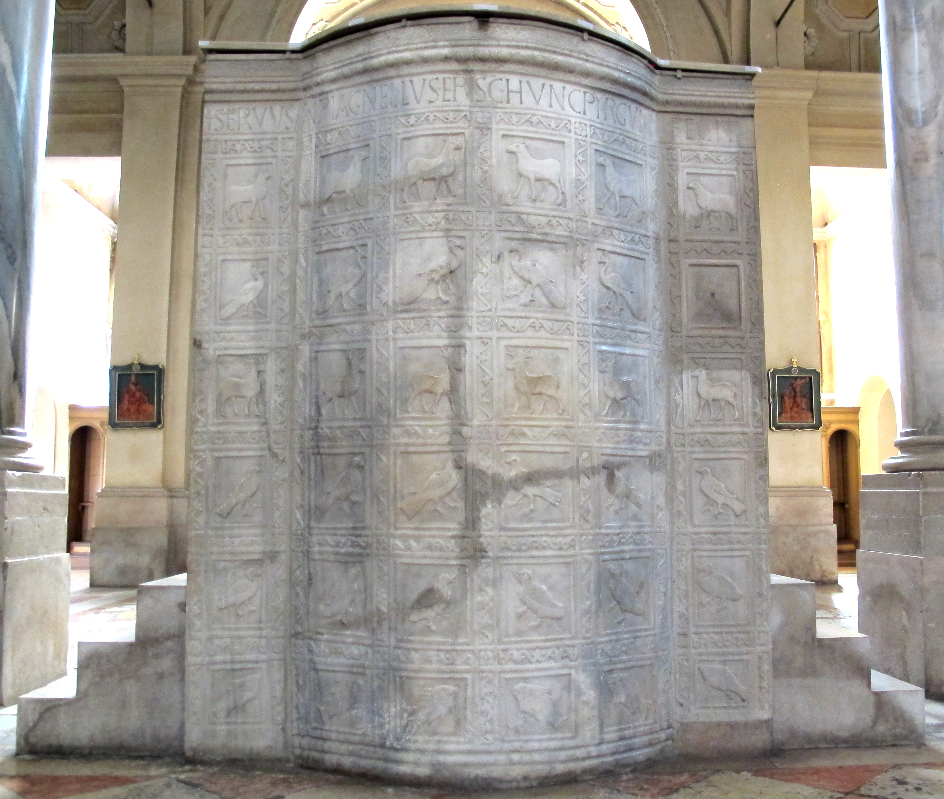 Duomo di ravenna, int., pulpito a torre del vecovo agnello, 550-600 ca.